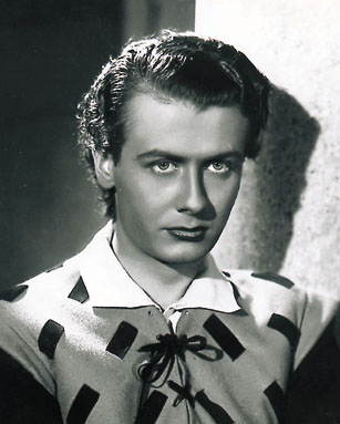 Italian actor Roberto Villa in a scene of the film Il fornaretto di Venezia di Duilio Coletti (1939)